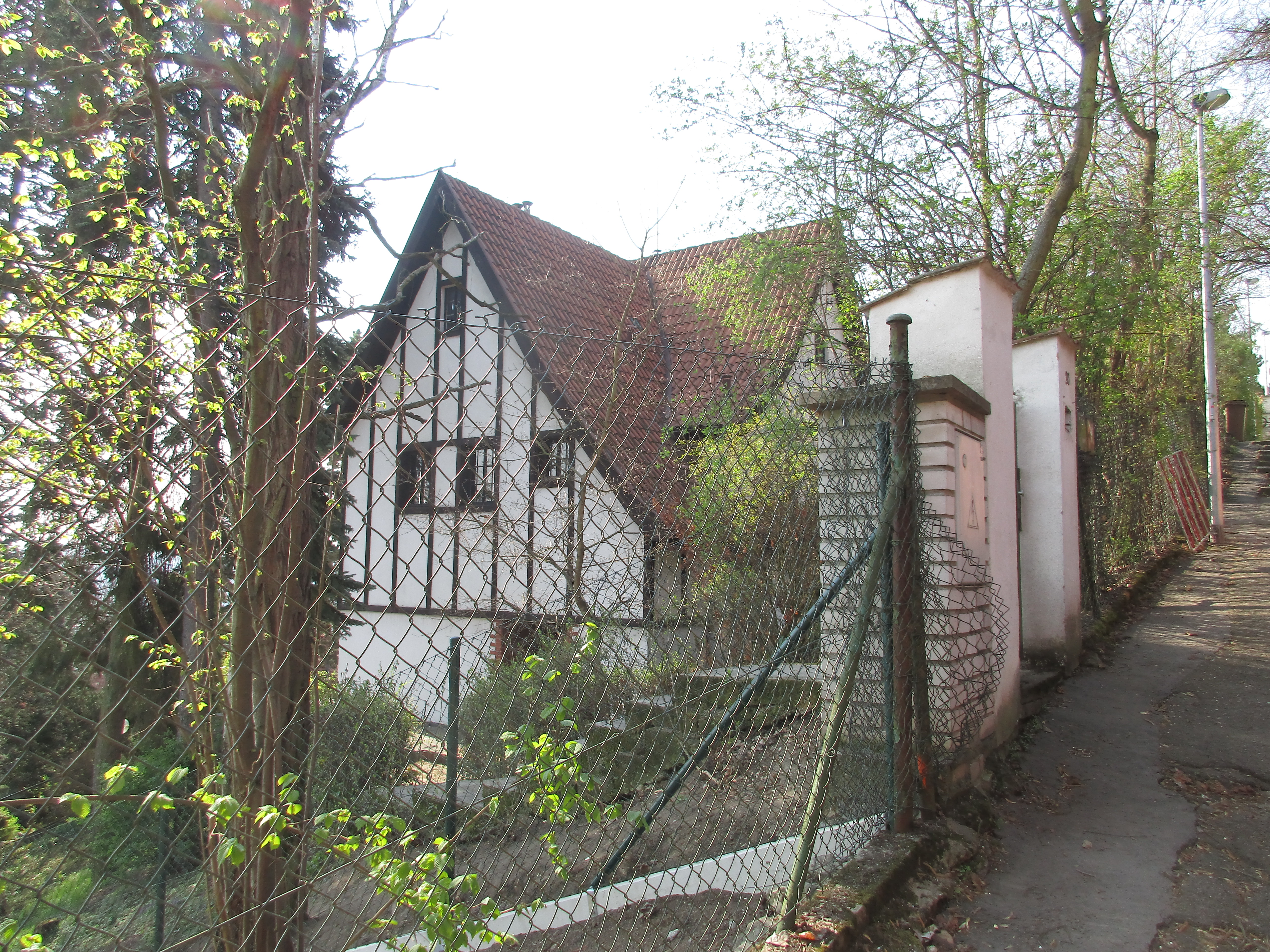 Barrandovská 446/18, Skalní 446/20, Praha 5-Hlubočepy